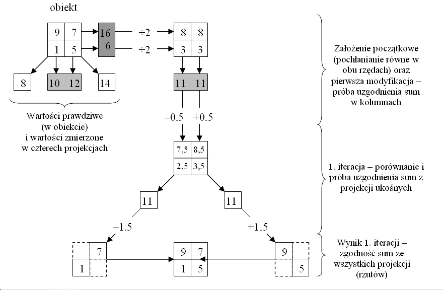 Idea rekonstrukcji obrazu tomograficznego metodą iteracyjną - promień po promieniu.